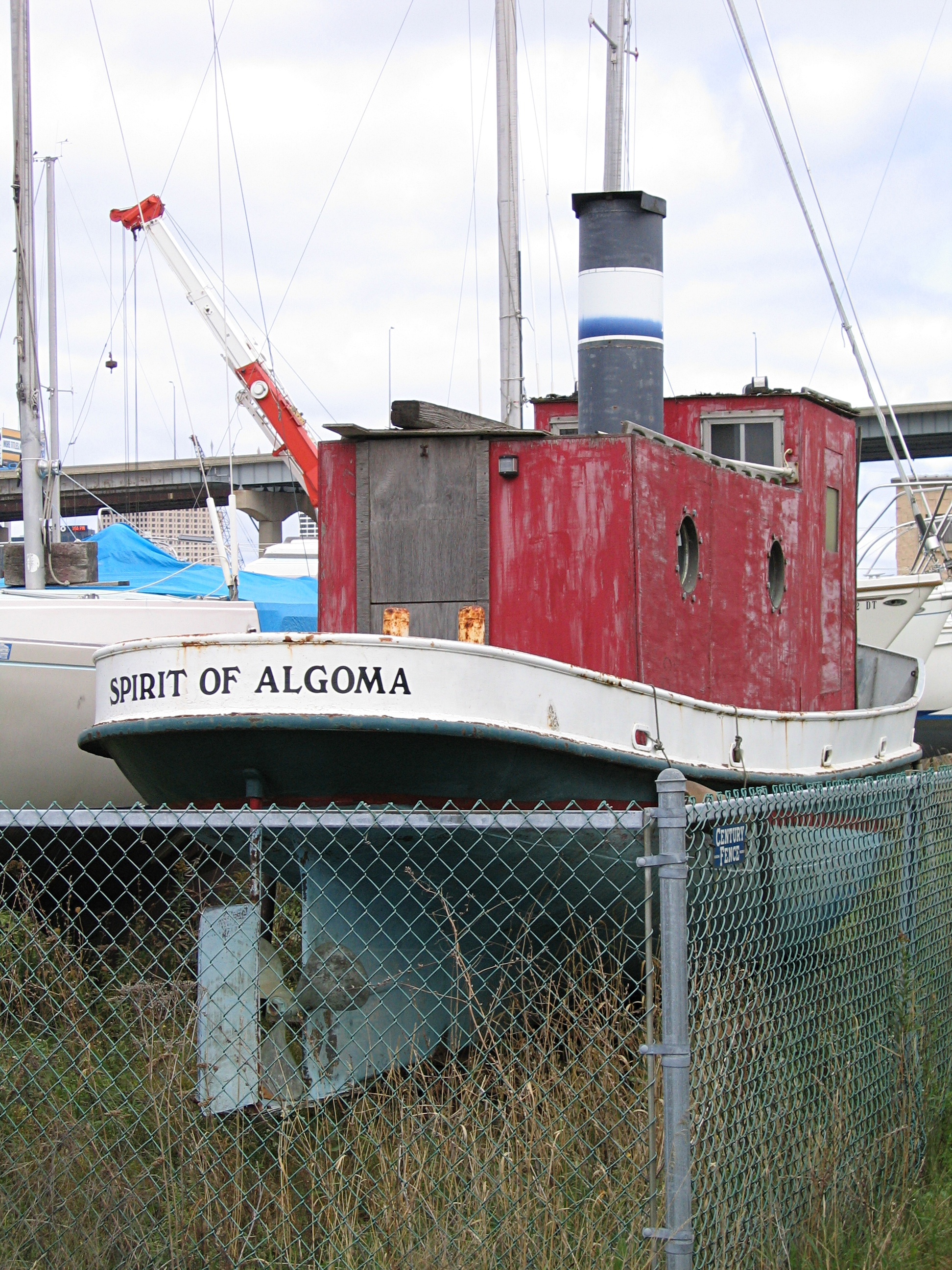 Spirit Of Algoma